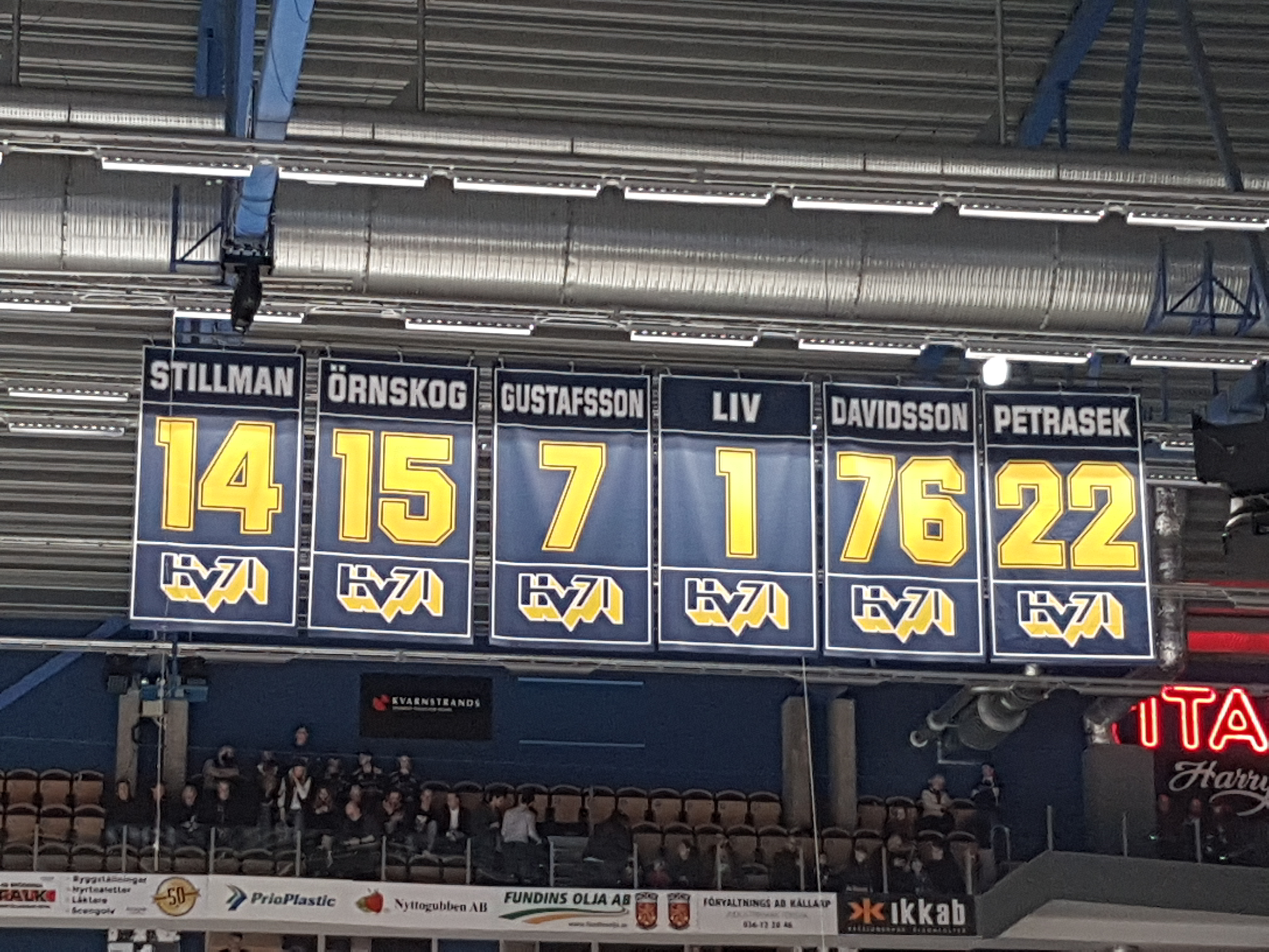 Pensionerade tröjnummer HV71.